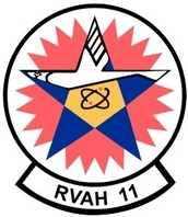 RVAH-11 insignia